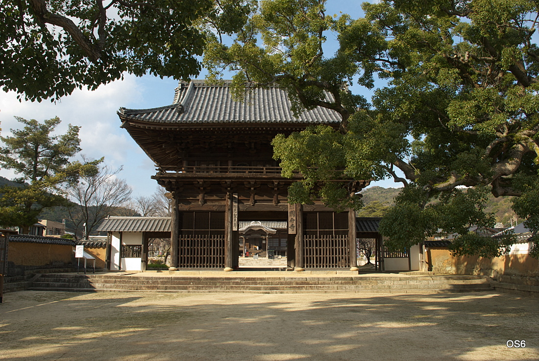 周防国分寺 (Temple)